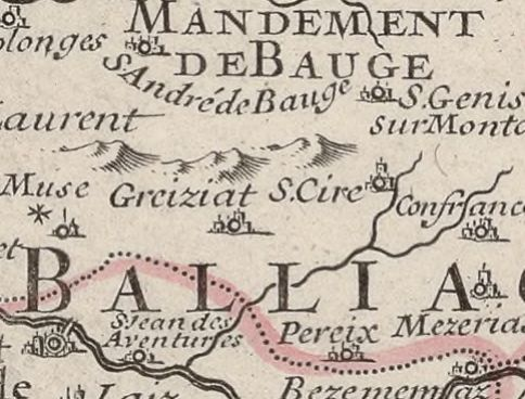 Extrait de la carte du Gouvernement Général du Duché de Bourgogne et de la Bresse ou sont divisez onze Grands Balliages et dix Balliages Subalternes, carte datant de 1710.